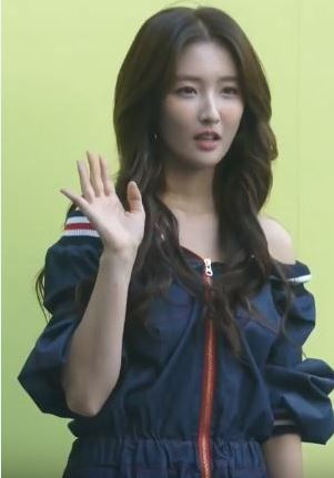 17일 오전 서울시 중구 동대문디자인플라자(DDP)에서 '2020 S/S 서울패션위크(SEOUL FASHION WEEK S/S 2020)' 블라뱅(BHALBANG) 박정상 디자이너의 컬렉션이 열려 멜로디데이 손지현X김혜진이 참석해 포토타임을 갖고 있다.